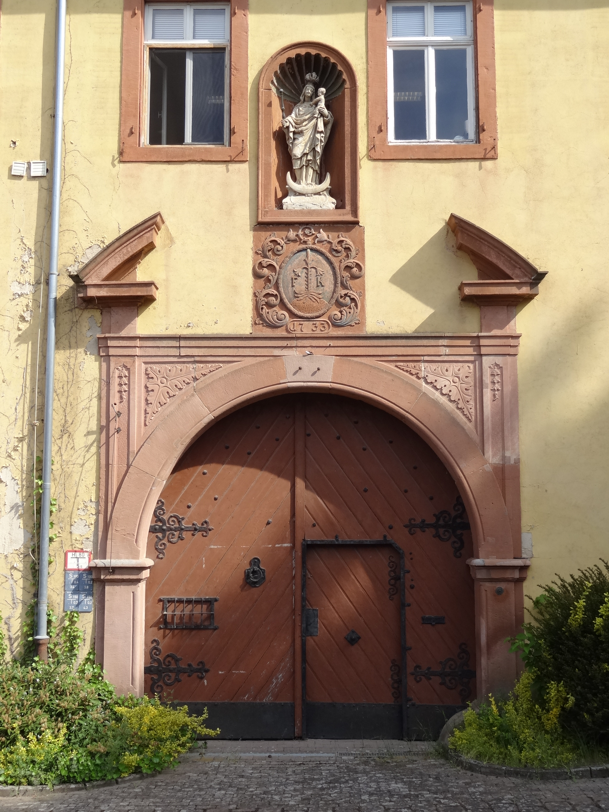 Östlicher Gebäudeflügel (JVA Rockenberg)